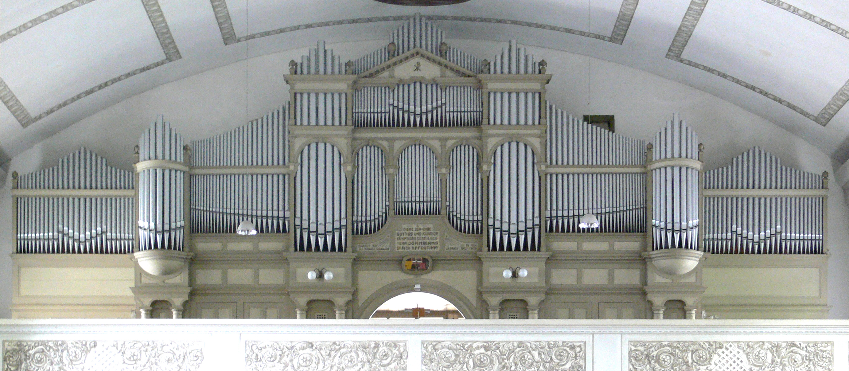 Dornbirn, Stadtpfarrkirche St. Martin Orgelprospekt